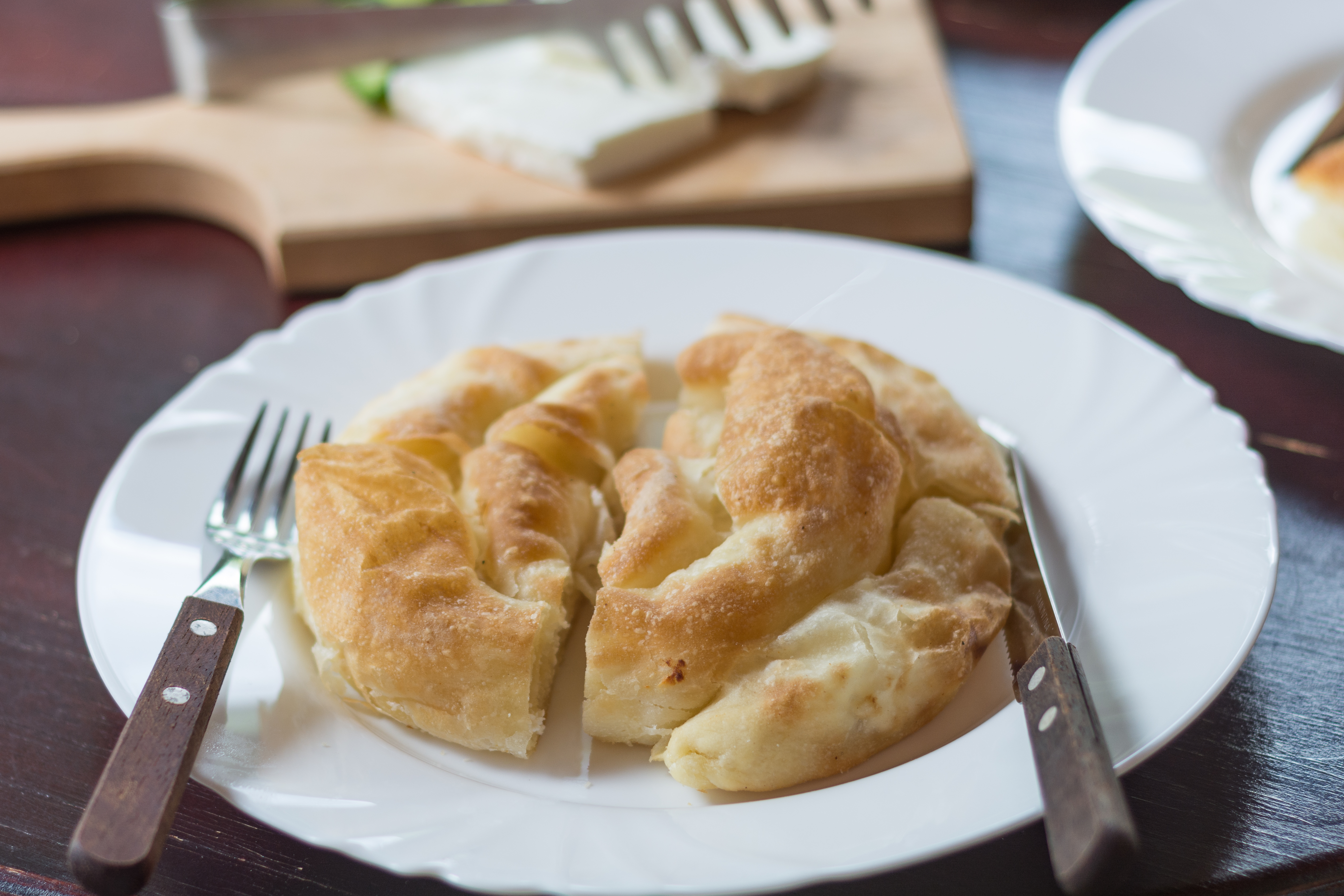 Традиционална реканска пита со сирење подготвена во ресторанот Кораб Трница во с.Трница, Општина Маврово и Ростуша